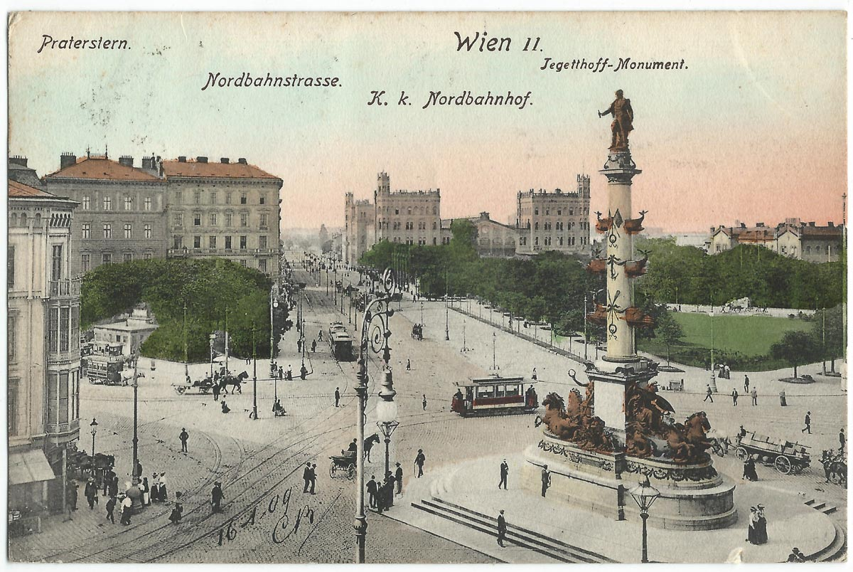 Vue de Vienne au début du XXe siècle.